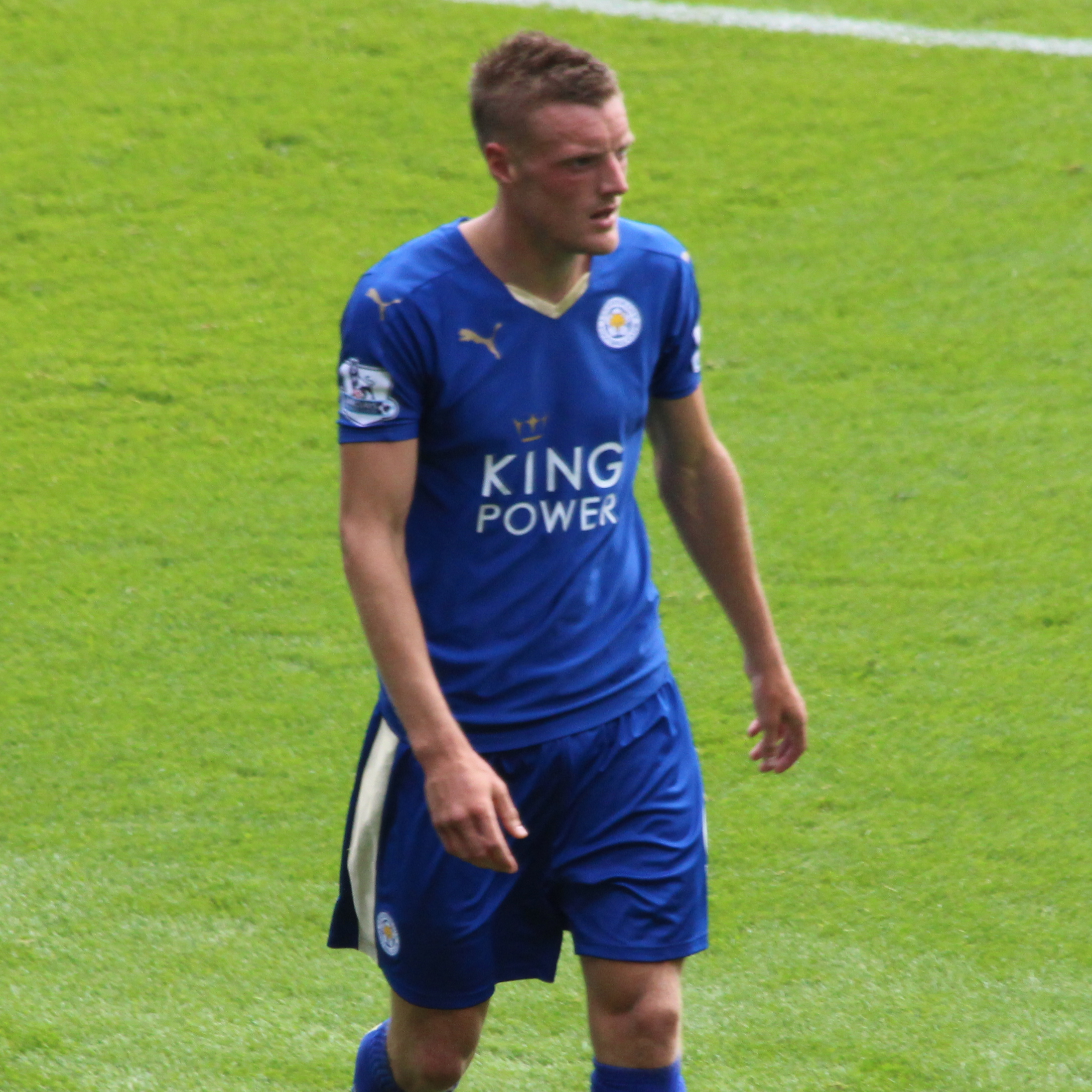 Leicester City vs Sunderland 4:2